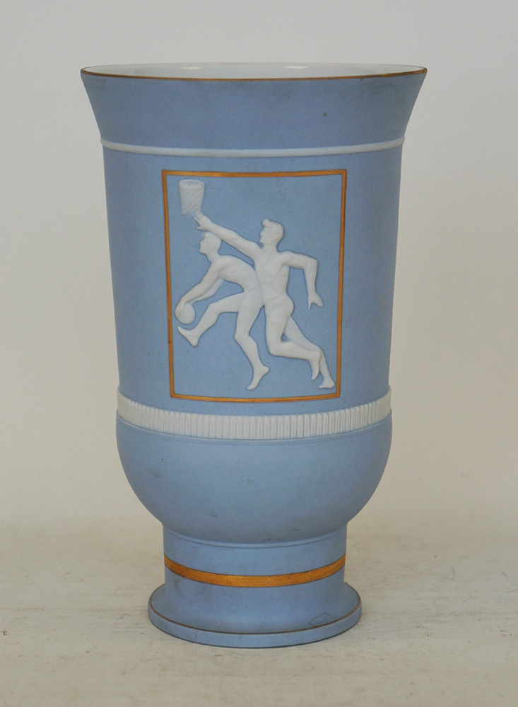 Фарфоровый кубок "Баскетболисты". К Олимпиаде-80. 1977 г. ЛФЗ. Быструшкин Б. Д.